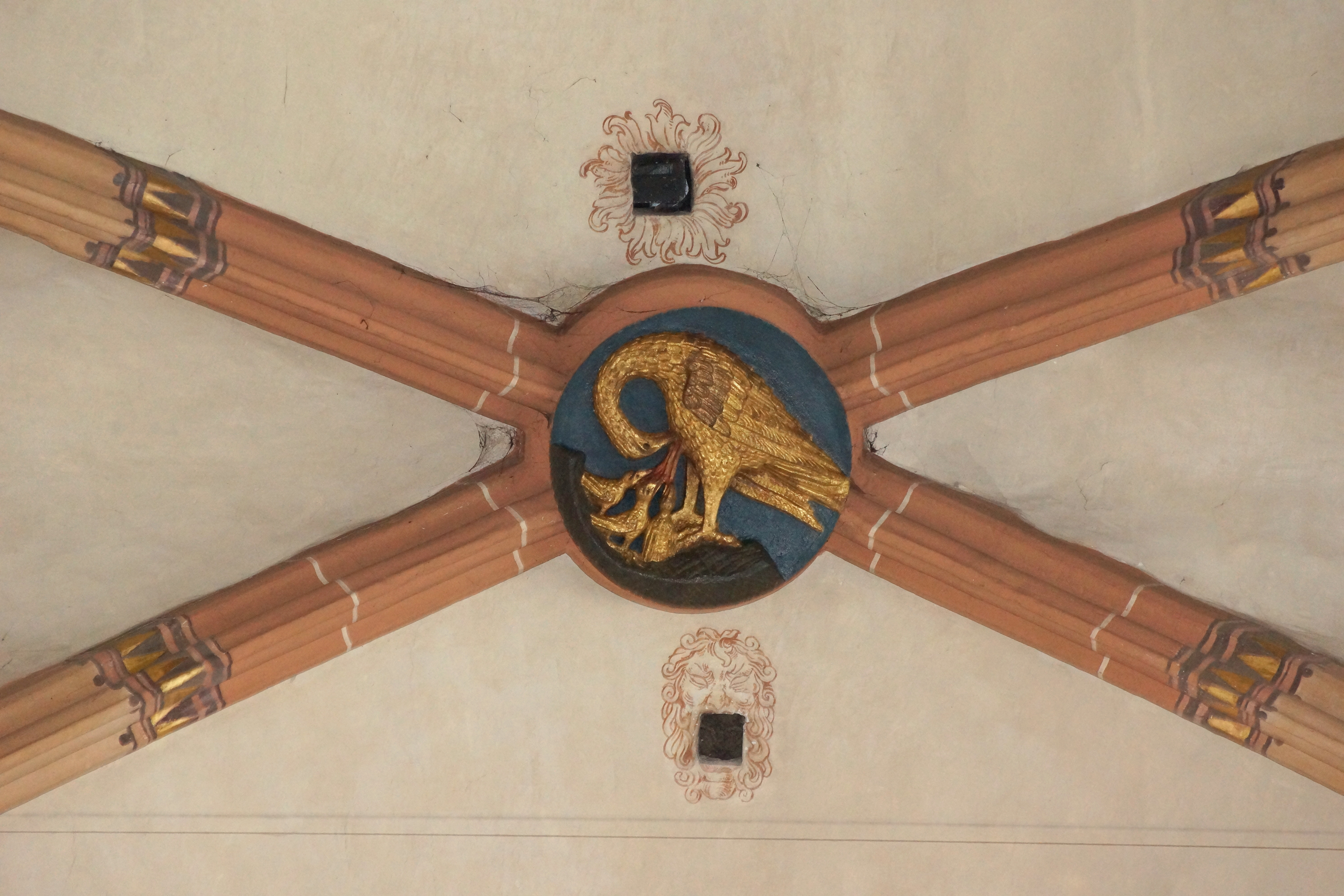 Kloster Seligenporten (Kreis Neumarkt in der Oberpfalz)